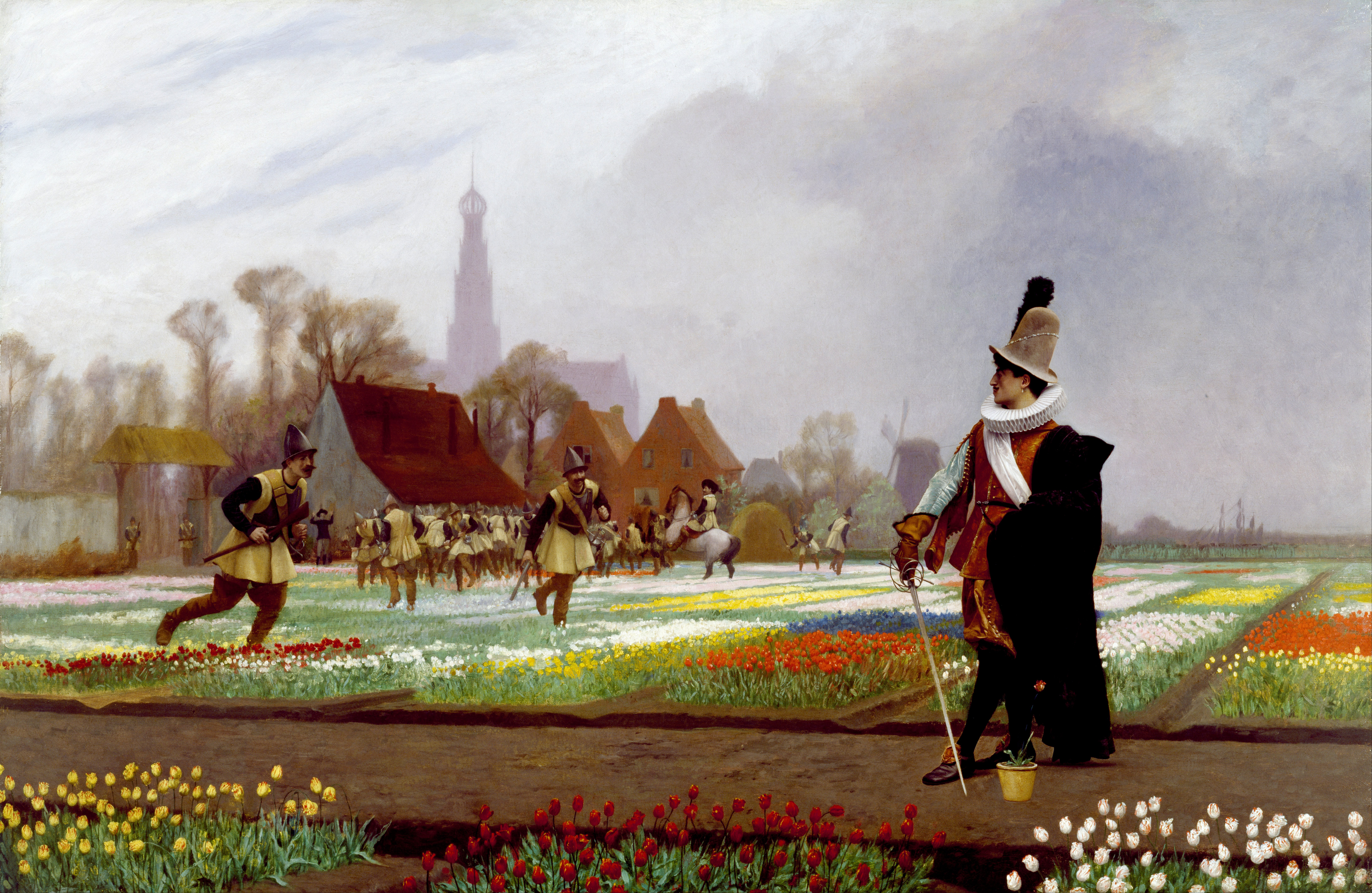 Ce tableau de Gérôme illustre un phénomène survenu au XVIIe siècle en Europe, et plus particulièrement aux Pays-Bas, alors appelés Les Provinces Unies. Originaire de Turquie, la tulipe fut importée en Europe au XVIe siècle avant de se répandre presque partout pour devenir un objet de luxe très prisé. L’engouement pour cette fleur, « la tulipomanie » atteignit son apogée au début du XVIIe siècle et son prix monta en flèche sur les marchés. Cette bulle spéculative creva vers 1636-37 et la valeur de la tulipe s’effondra pour ne rapporter à ses propriétaire que 5 % de leur investissement initial. Le tableau de Gérôme dépeint un noble qui tente de protéger son parterre particulièrement florissant des soldats expédiés pour le détruire. En limitant ainsi la production de la plante, les autorités espéraient lui rendre la valeur perdue. (Source : The Walters Art Museum) (Voir aussi l'article de Wikipédia sur la tulipomanie.)